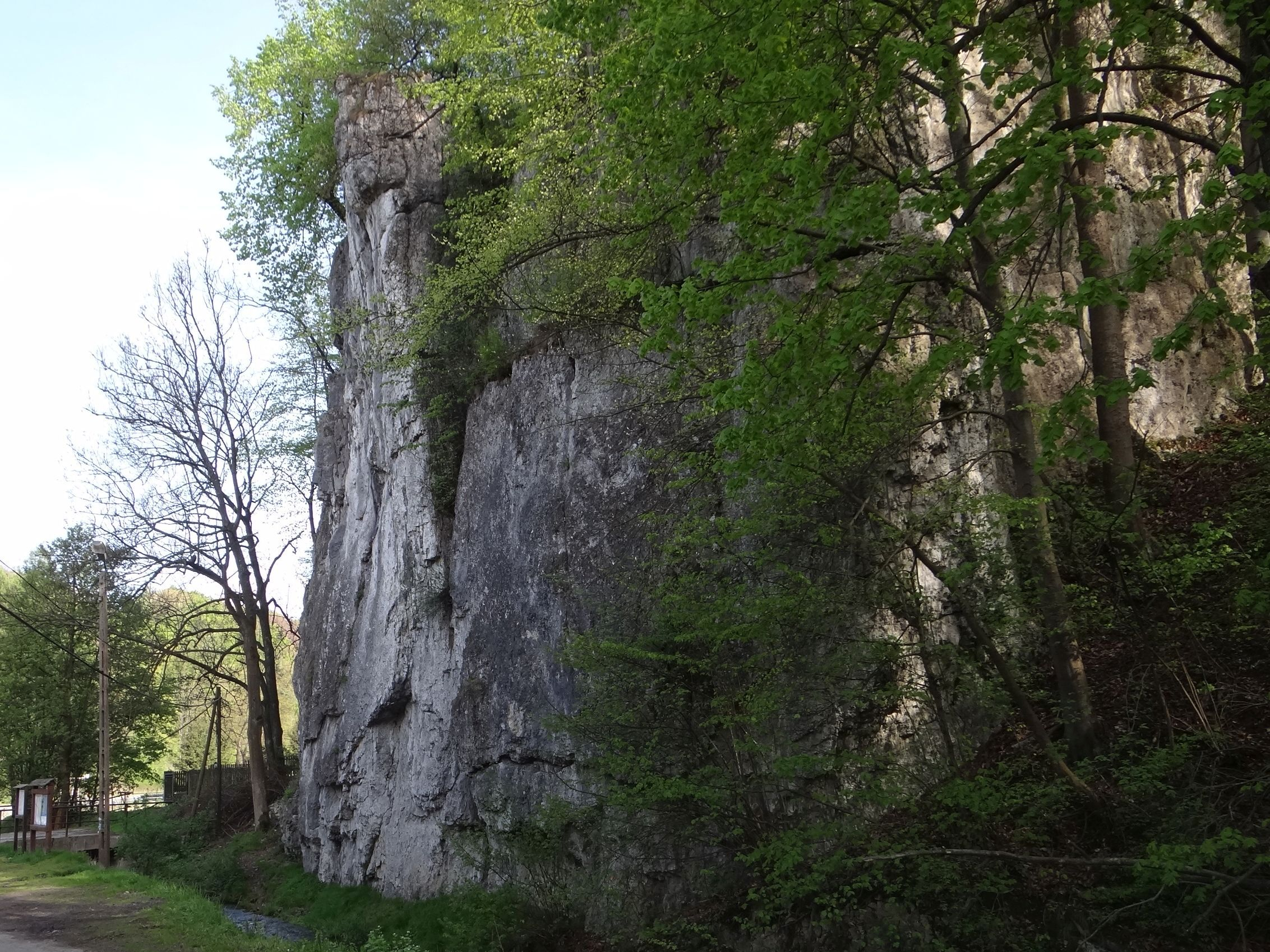 Skała nad Potokiem w Sułoszowej